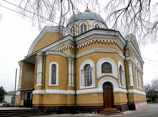 Pokrovský chrám ve Smile